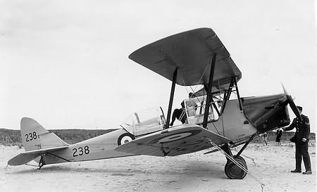 De Havillan Tiger Moth Source:Archives du 438e escadron à St-Hubert